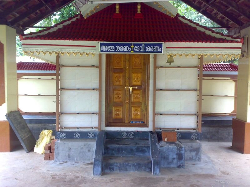 Mathur Padinjharethara Kalikavil Bhagawathy Kshethram.